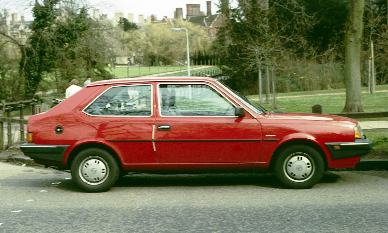 Volvo 340 in Cambridge